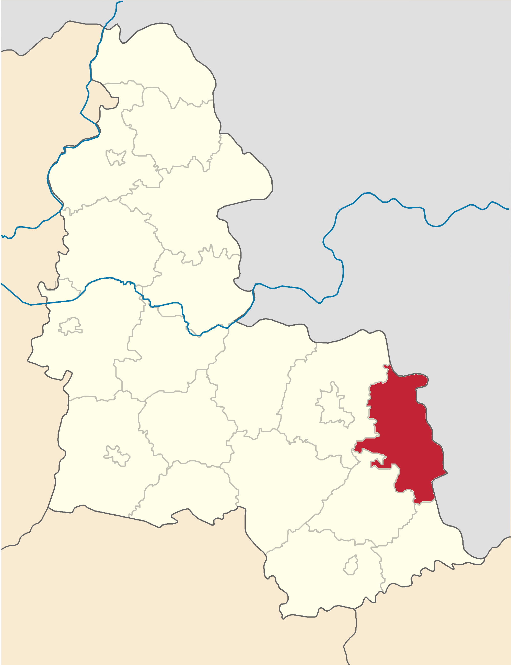 Krasnopilskyi-Raion map